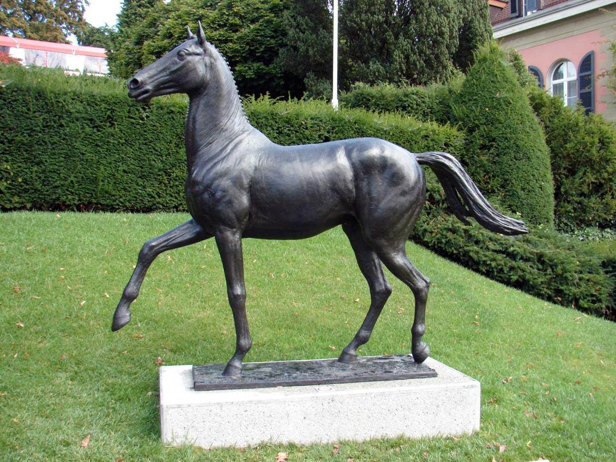 Statue représentant le cheval Jappeloup